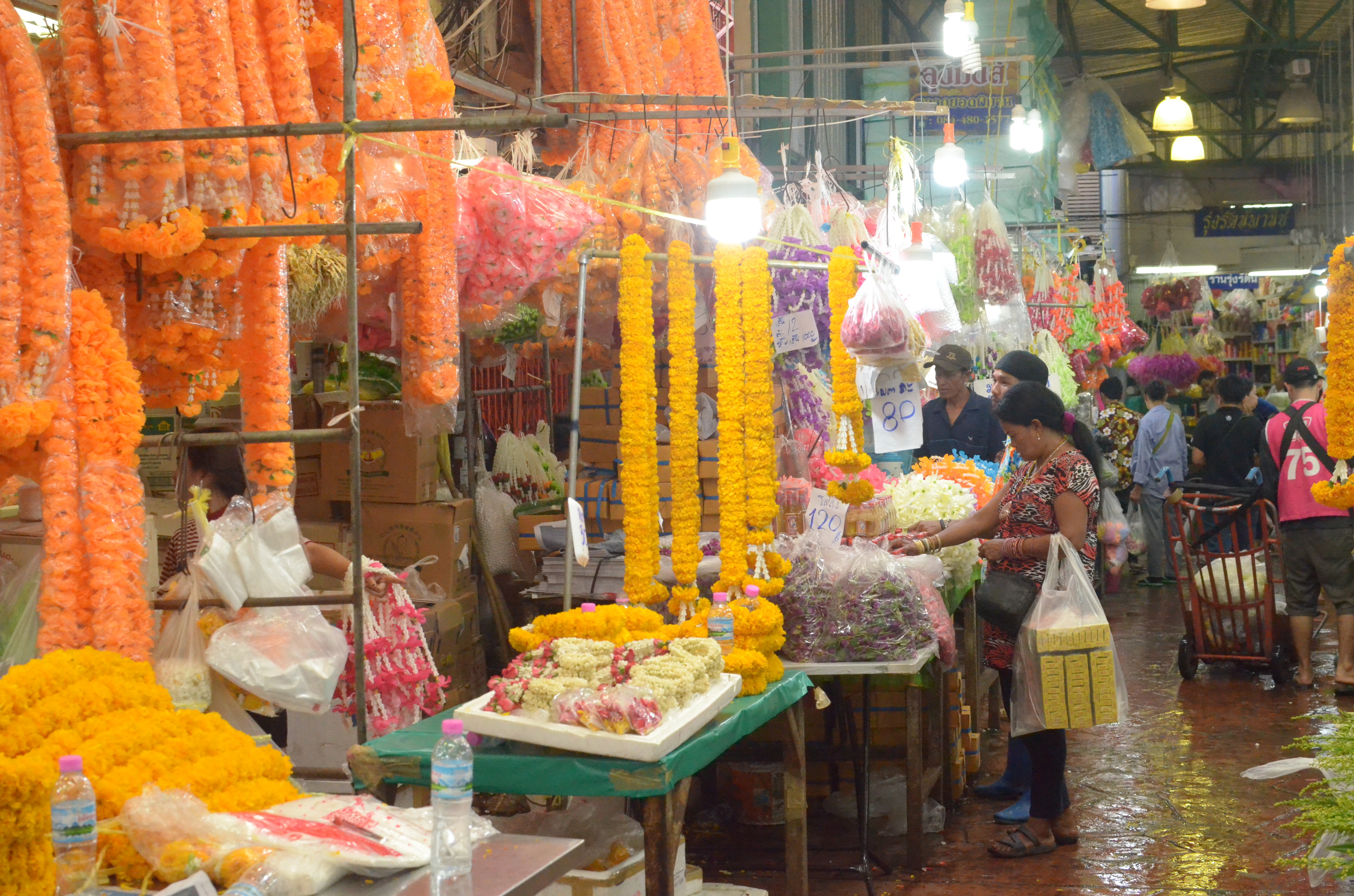 ดอกไม้สีเหลืิองในตลาดค่าส่งดอกไม่